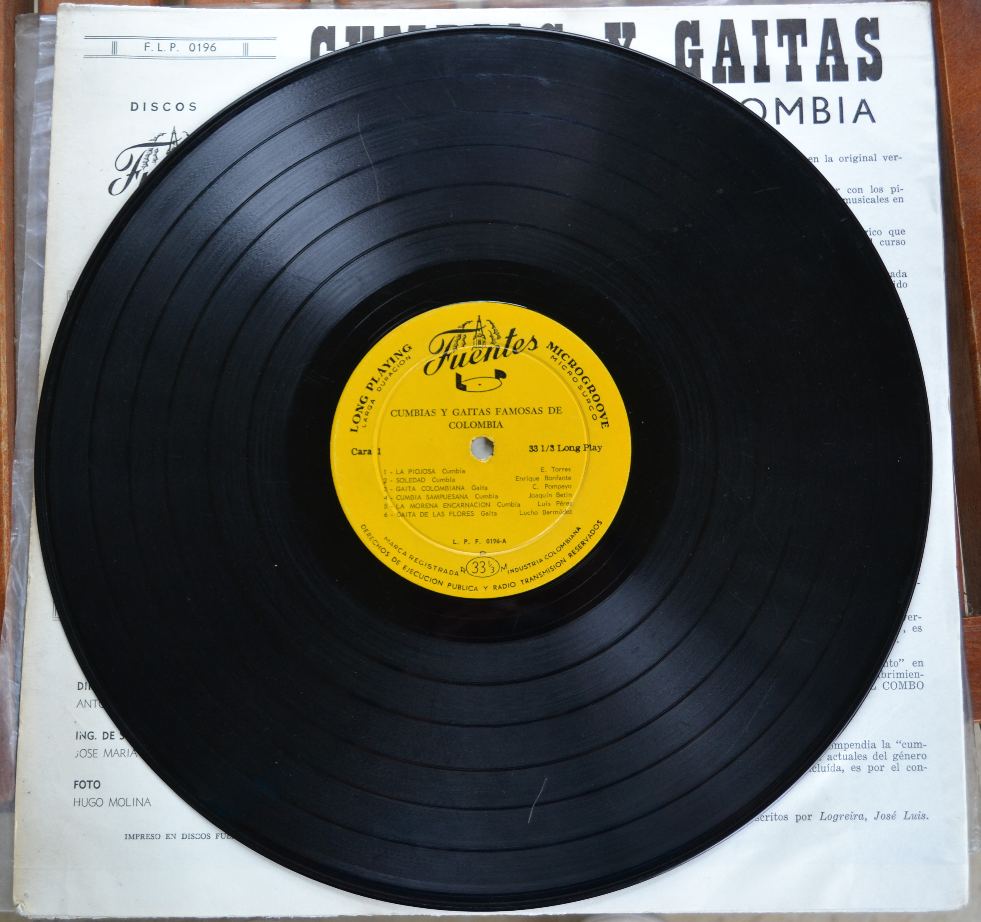 Discos Fuentes LP record